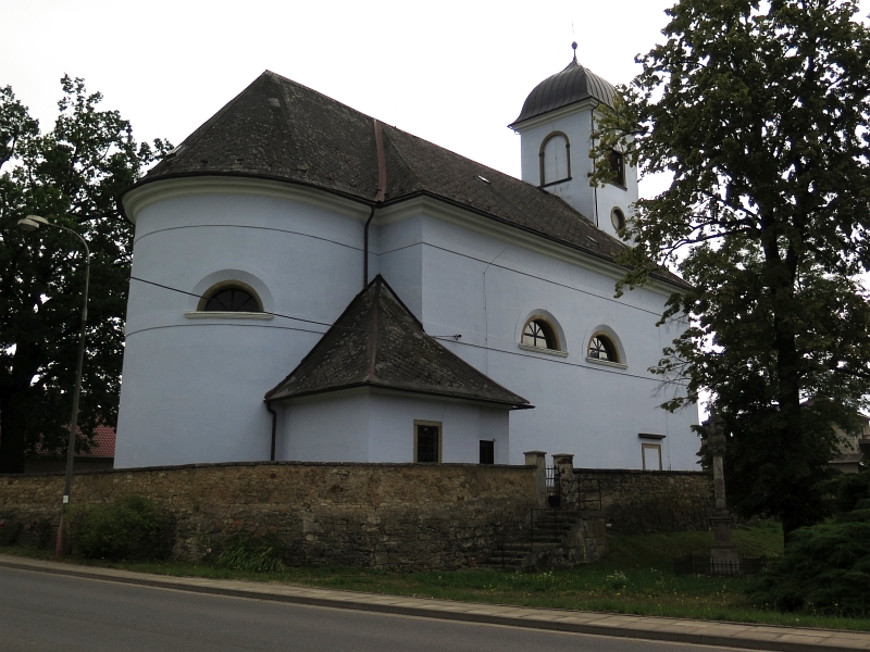 Kostel svatých Petra a Pavla, náves, Lubník.